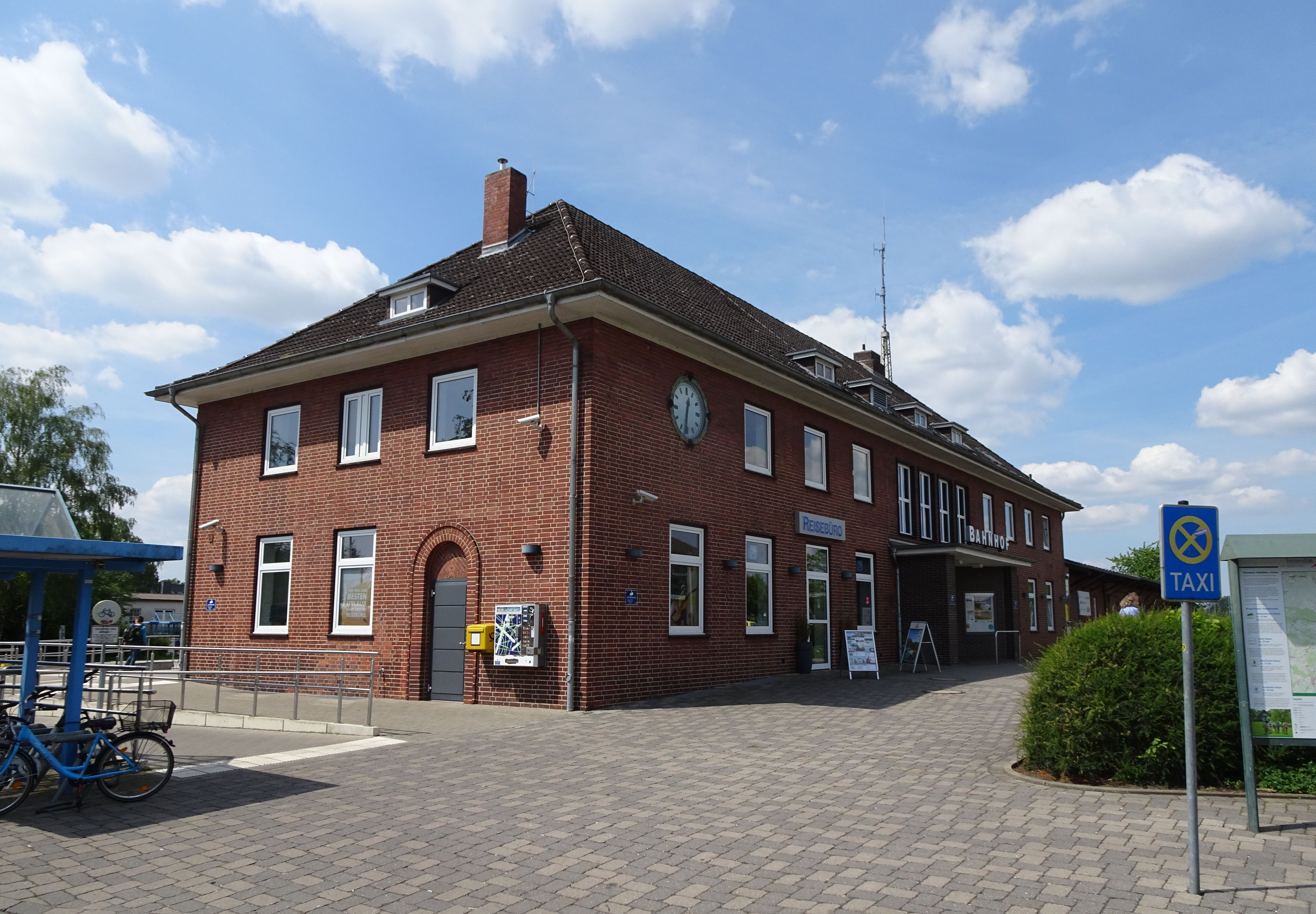 Bahnhof Bremervörde 2019